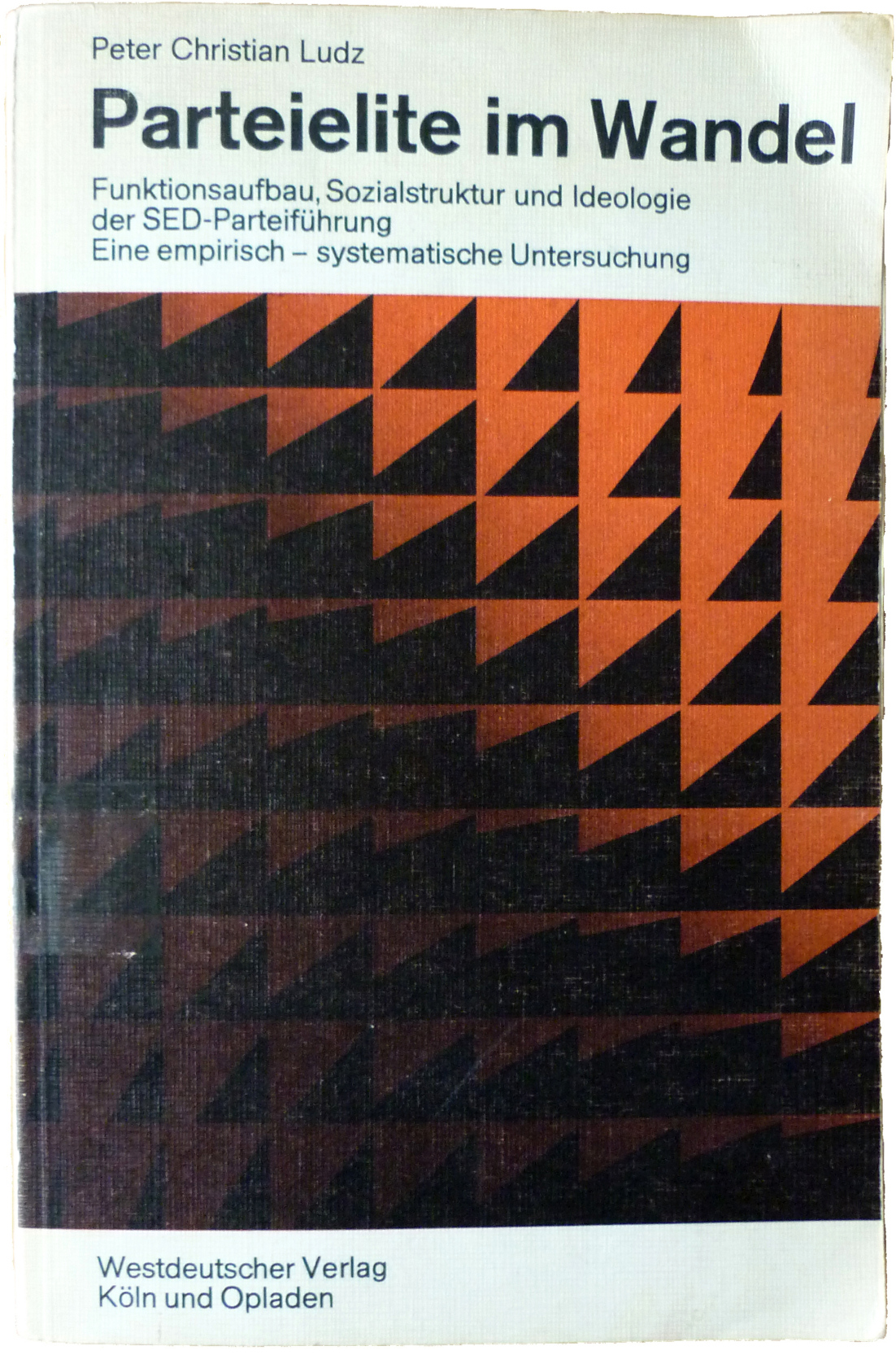 Cover of: Peter Christian Ludz, Parteielite im Wandel, 3. Edition, Westdeutscher Verlag, Köln & Opladen 1968